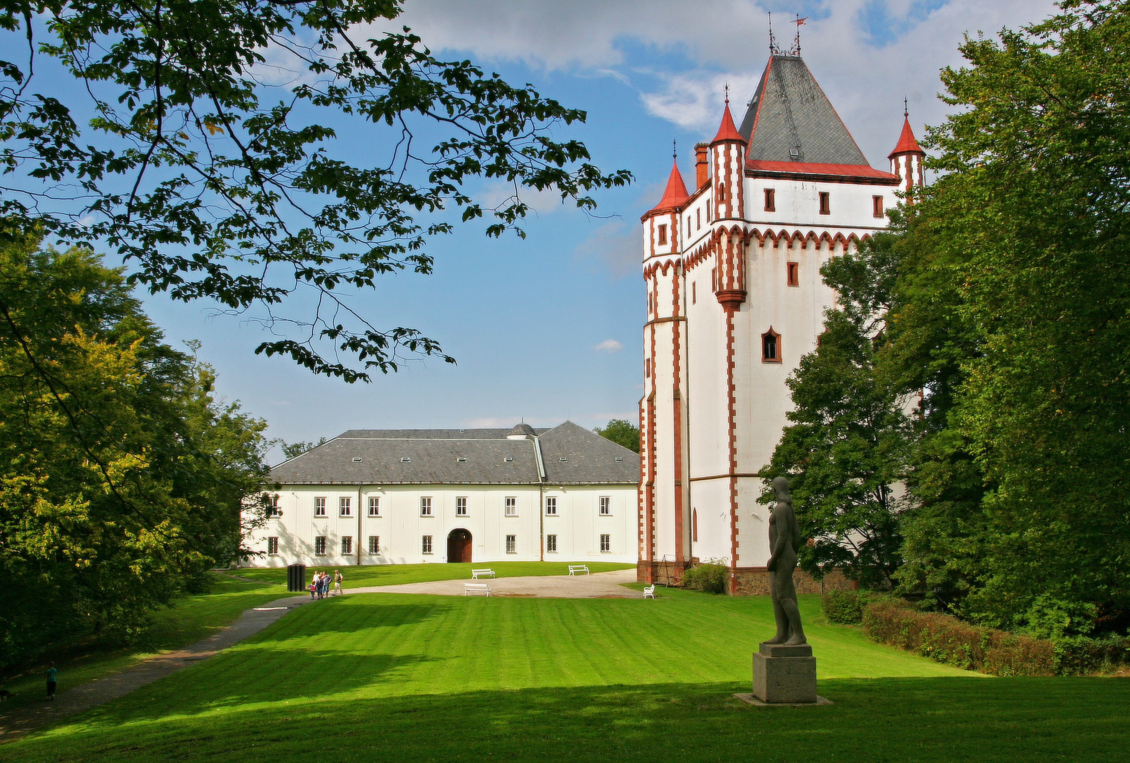 Zámek Hradec nad Moravicí, náměstí Československé armády 1, Hradec nad Moravicí.